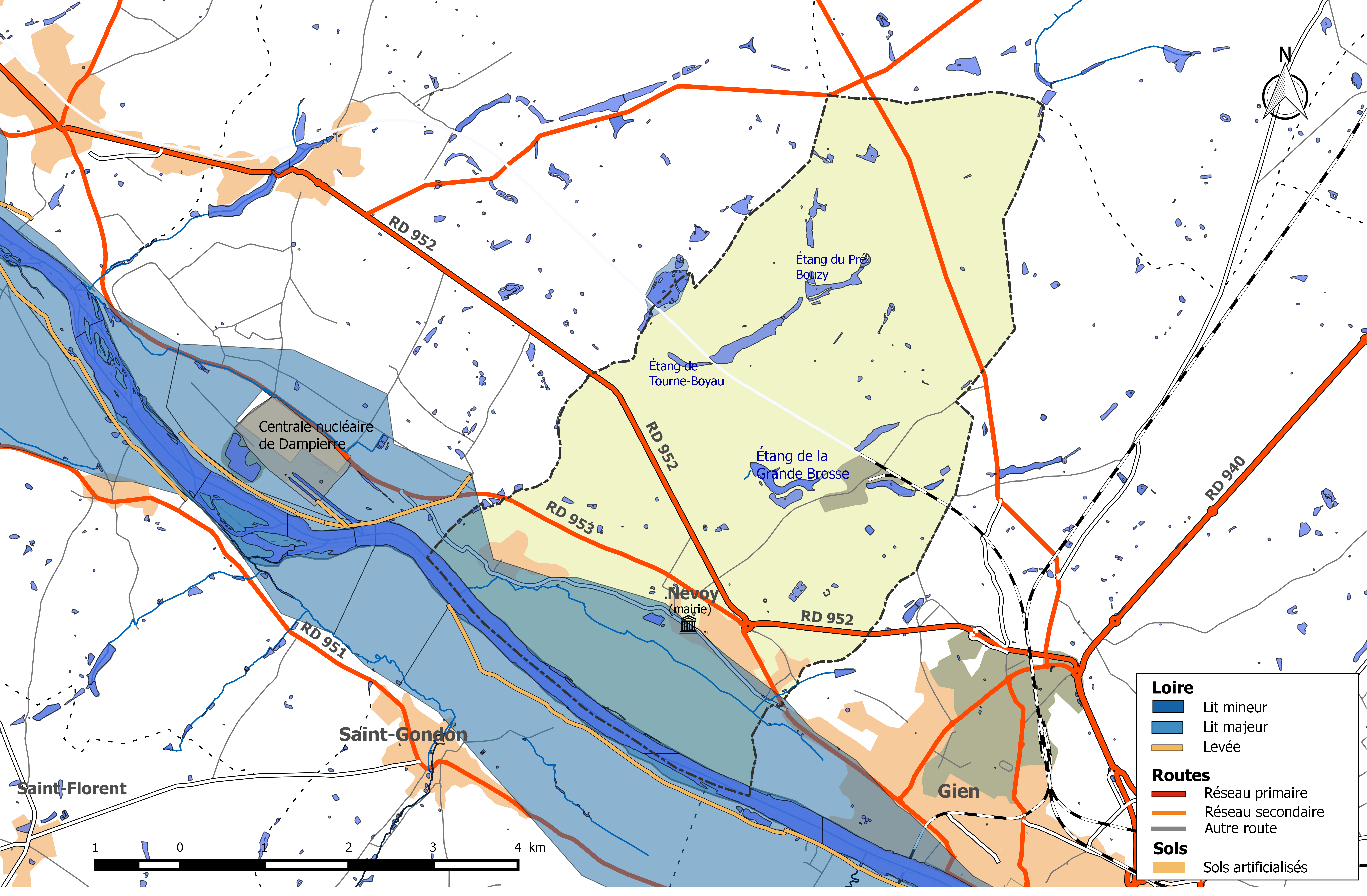 Zone inondable et réseaux hydrographique et routier de la commune de Nevoy